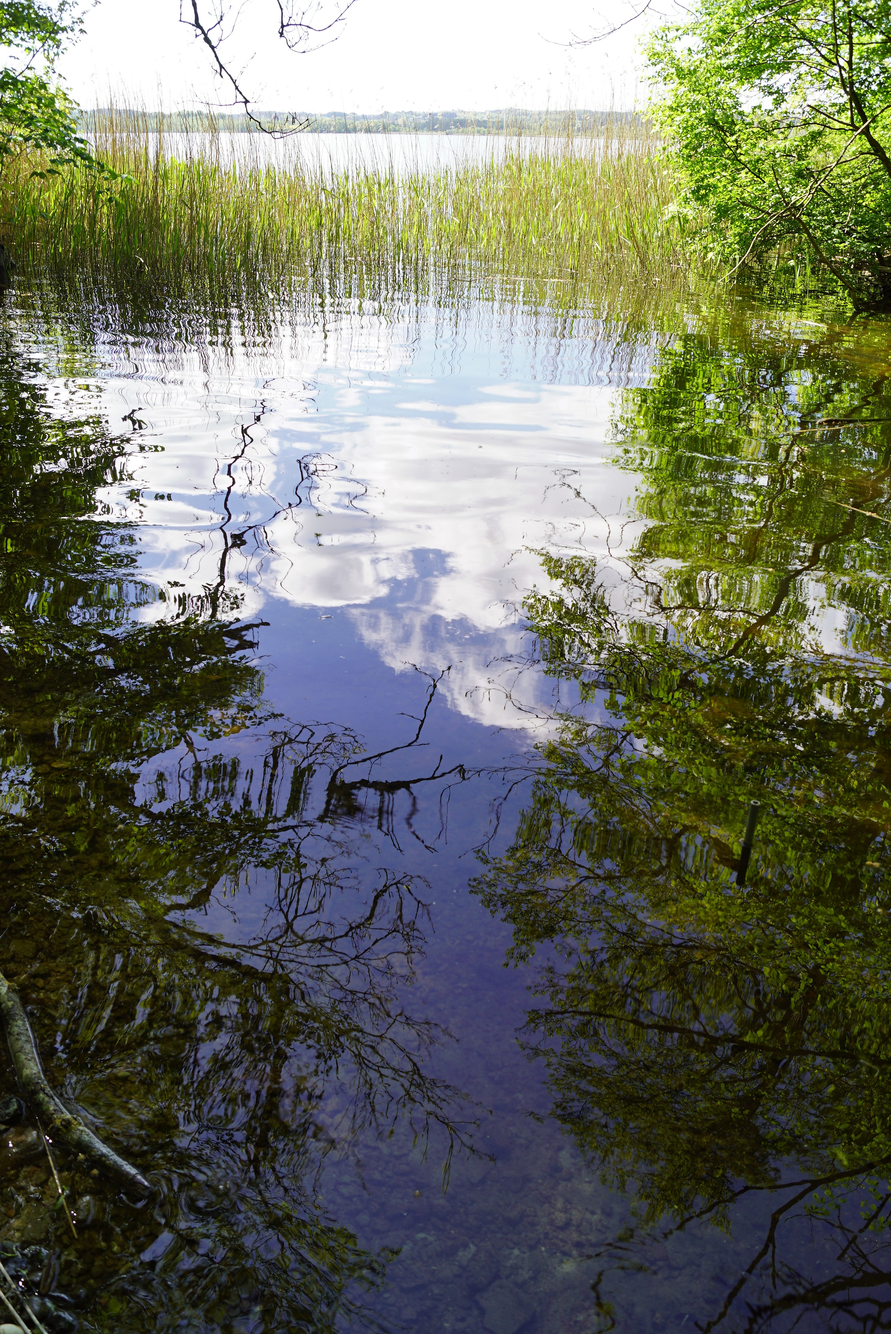 Odense Ås begyndelse ved udløbet af Arreskov Sø på Fyn